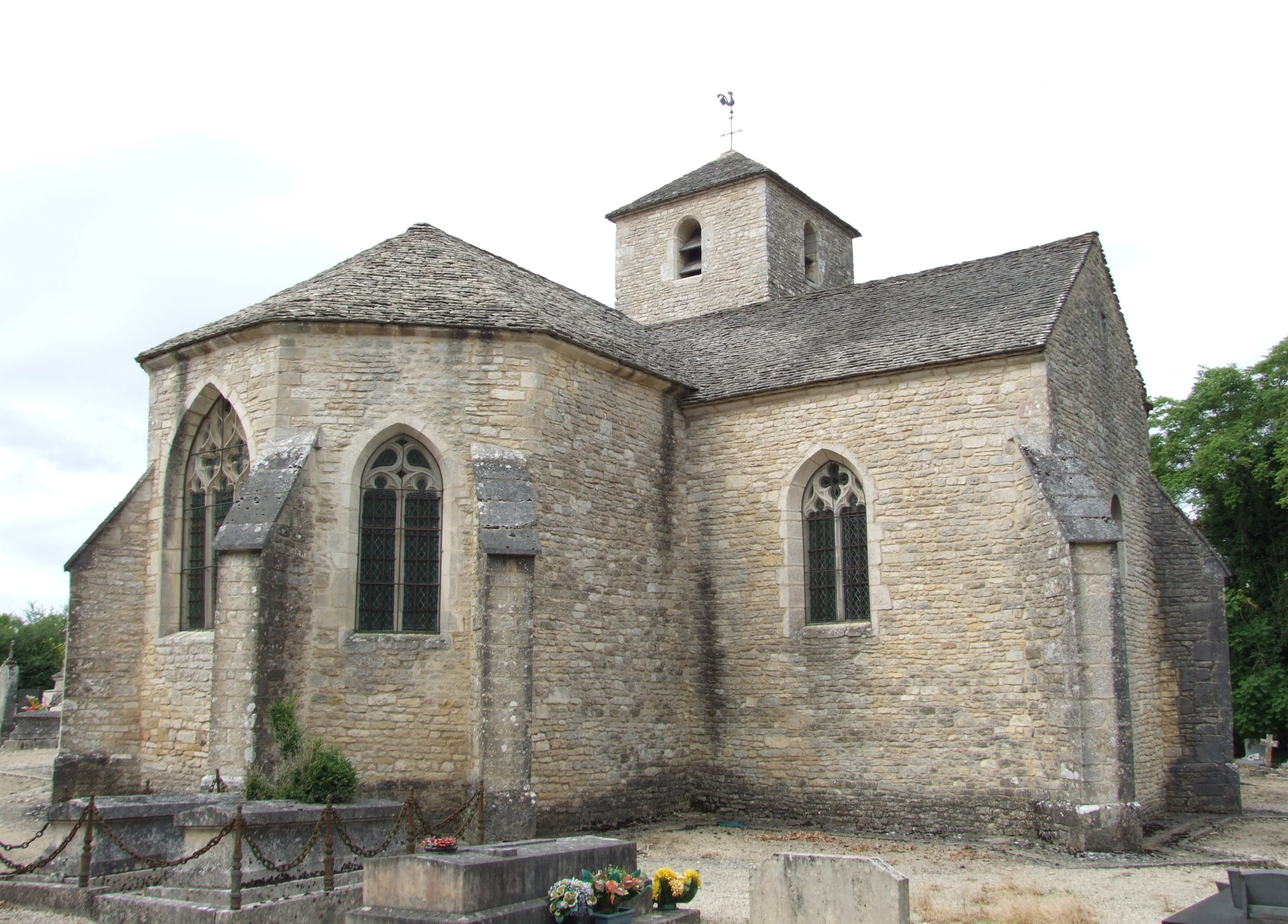 Église Saint-Marcel de Vix, Vix, Côte-d'Or, Bourgogne, FRANCE